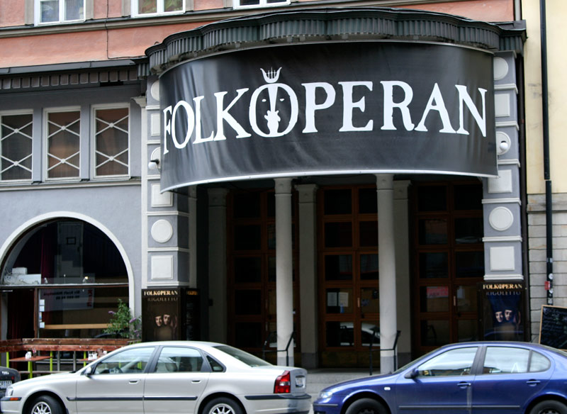 Folkoperans fasad, Hornsgatan 72 Stockholm Fotograferad maj 2006 Fotograf: Jimmy Svensson